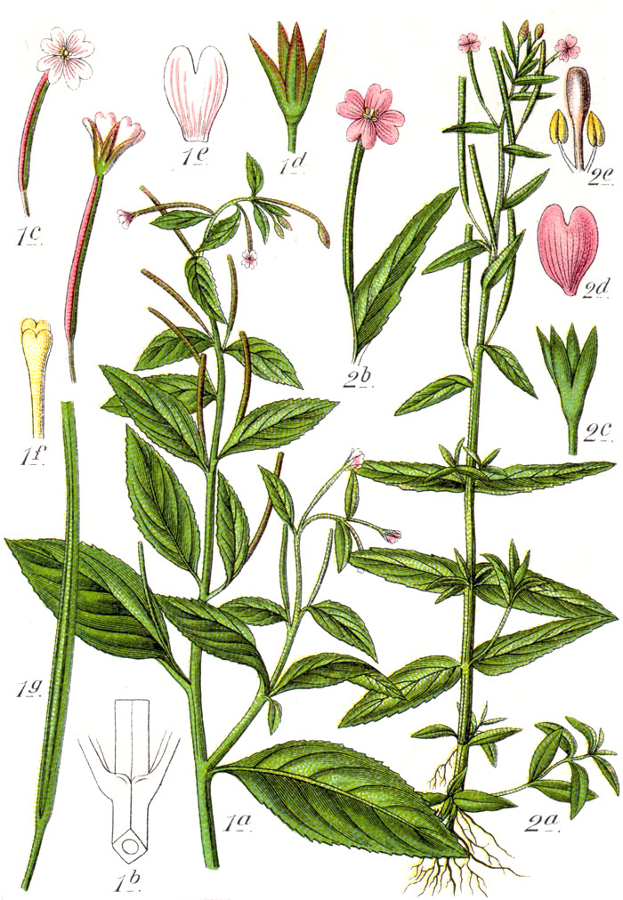 1. Epilobium roseum Schreb. 2. Epilobium obscurum Schreb. Original Caption 1. Echtes Weidenröschen, Epilobium roseum 2. Dunkles Weidenröschen, E. obscurum